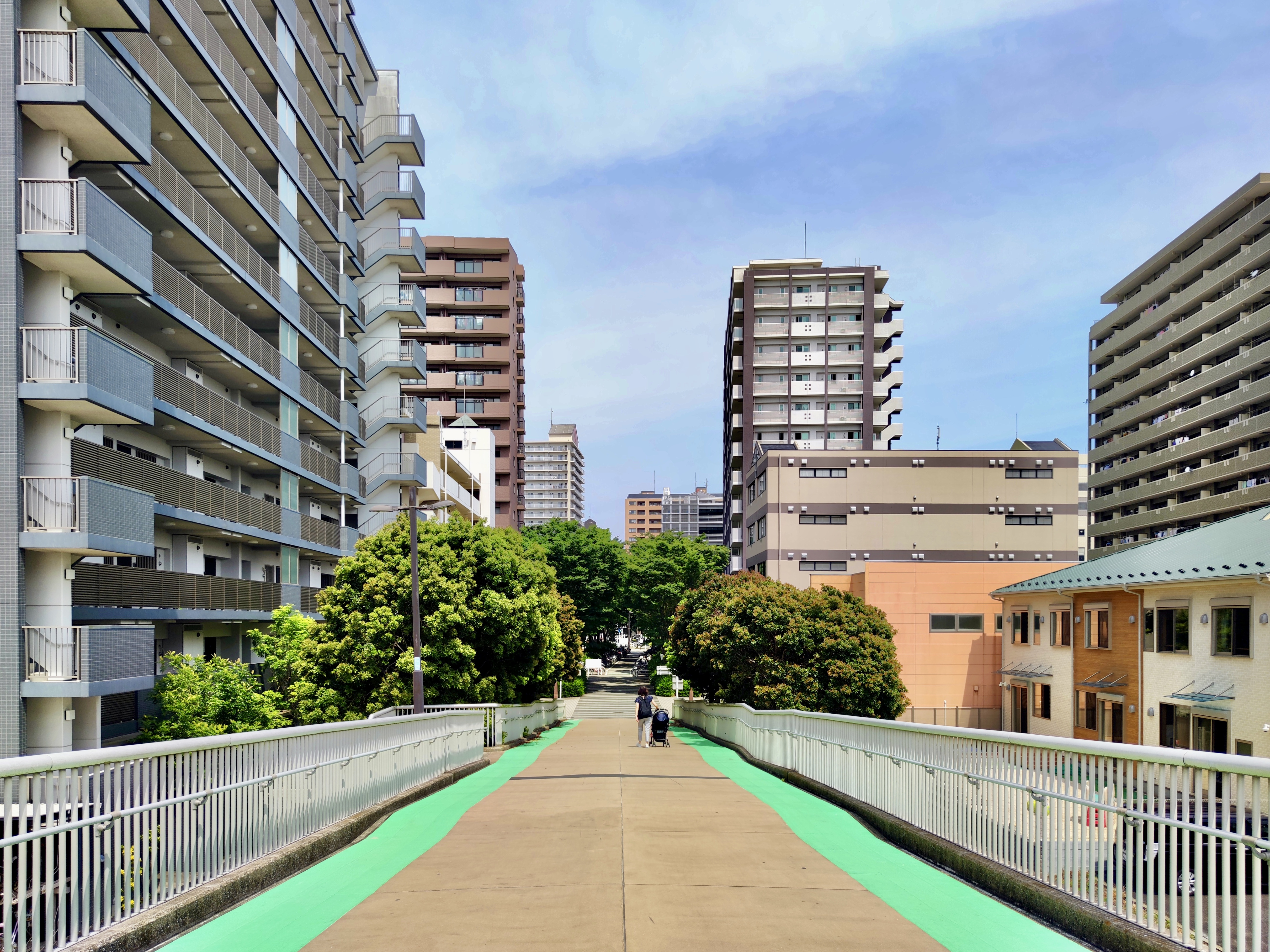 おゆみ野マンション街 夏の道